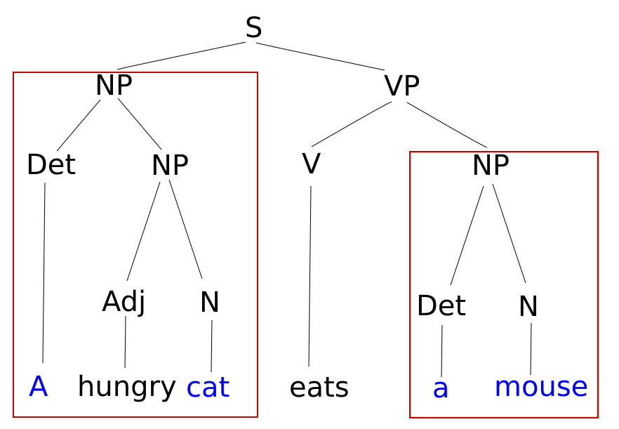 Rozbiór zdania: A hungry cat eats a mouse